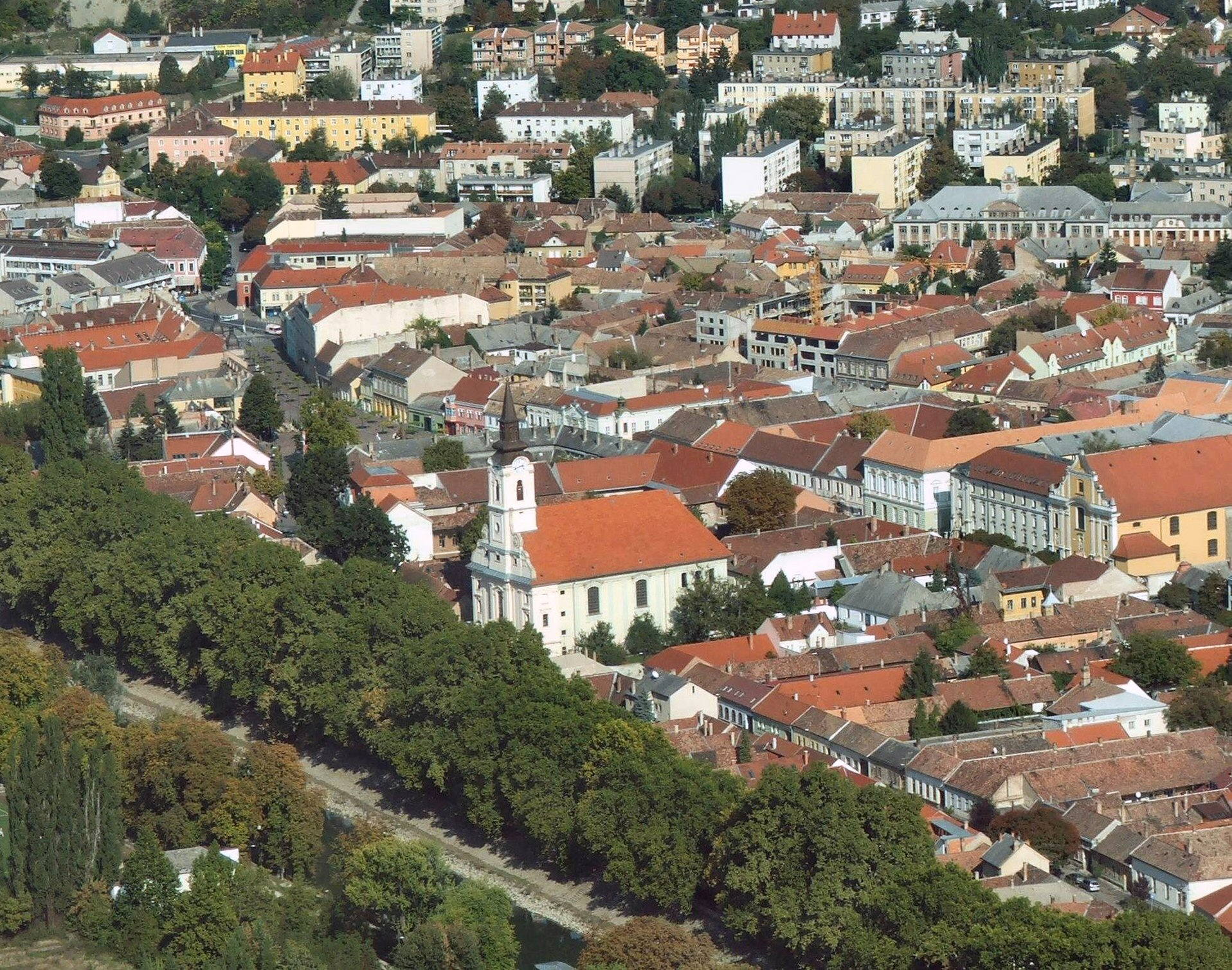 Eszterom, Öregtemplom